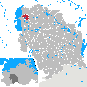 Cambs in Mecklenburg-Vorpommern - District Parchim